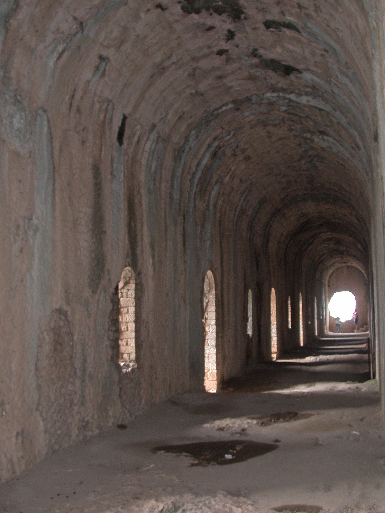 Terracina (provincia di Latina, Lazio, Italia), tempio di Giove Anxur, corridoio interno della terrazza su cui sorgeva il tempio, con finestre verso l'esterno